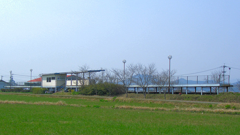 くま川鉄道湯前線ja:公立病院前駅 外観 撮影者/著者/著作権保有者 : MK Products (本人がアップロード) 撮影日 : 2007/03/22 公立病院前駅用にアップロードした画像です。良い画像があれば別の画像に変えてください。